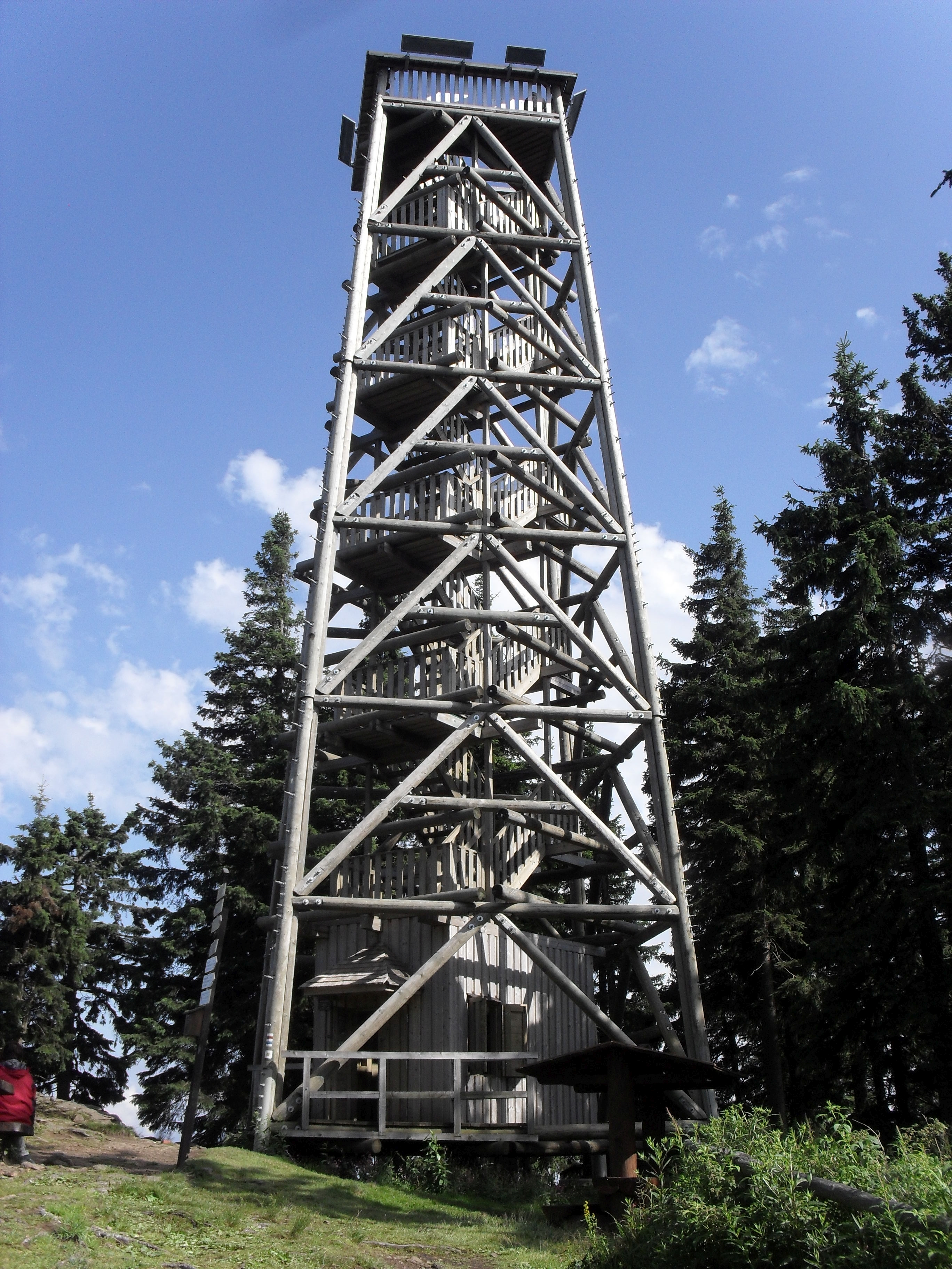 Můj dávný výlet na Šumavský Boubín. (Tato rozhledna byla postavena v roce 2004.)